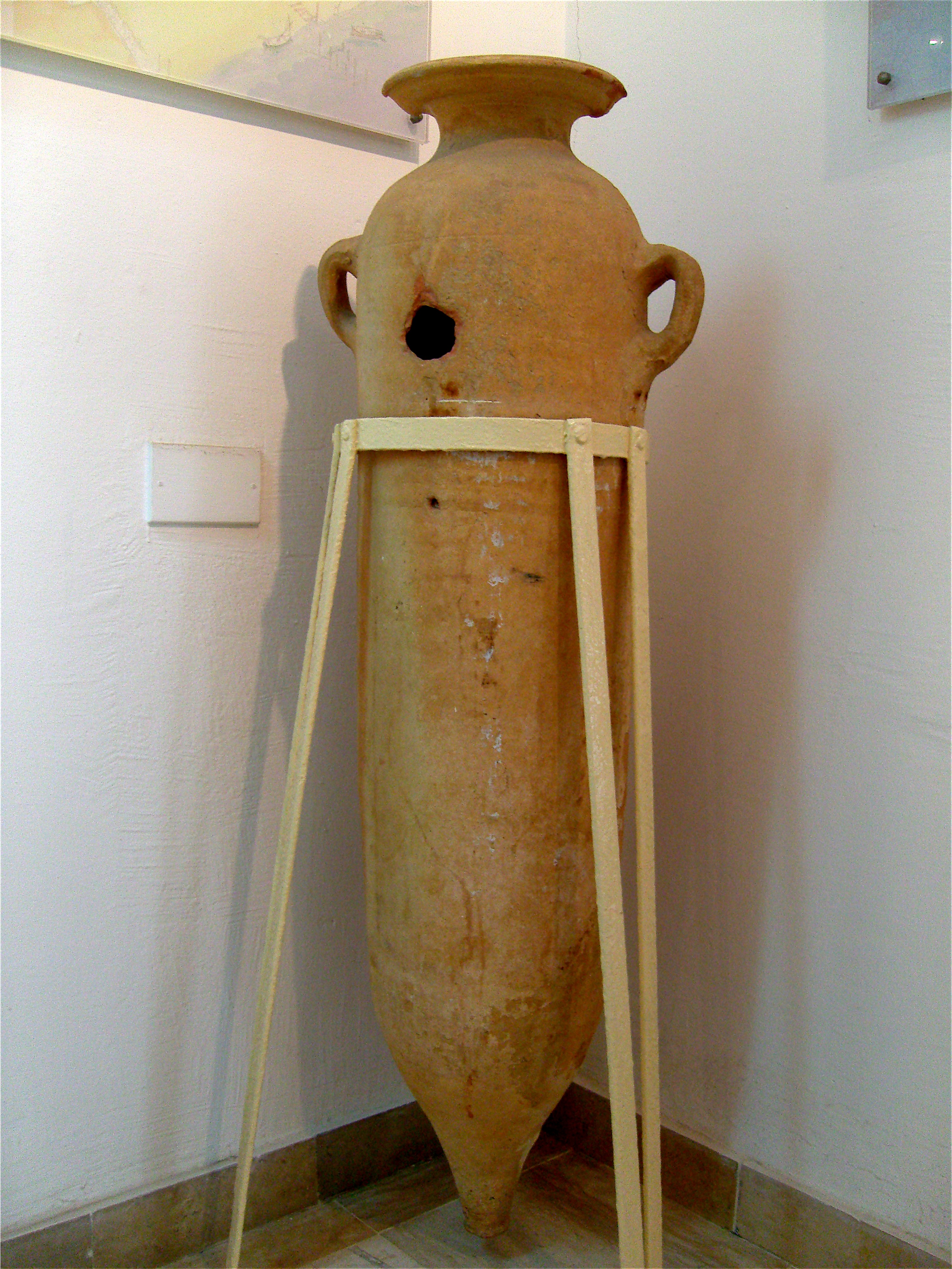 Amphore en terre cuite exposée au musée Néapolis de Babeul-Tunisie